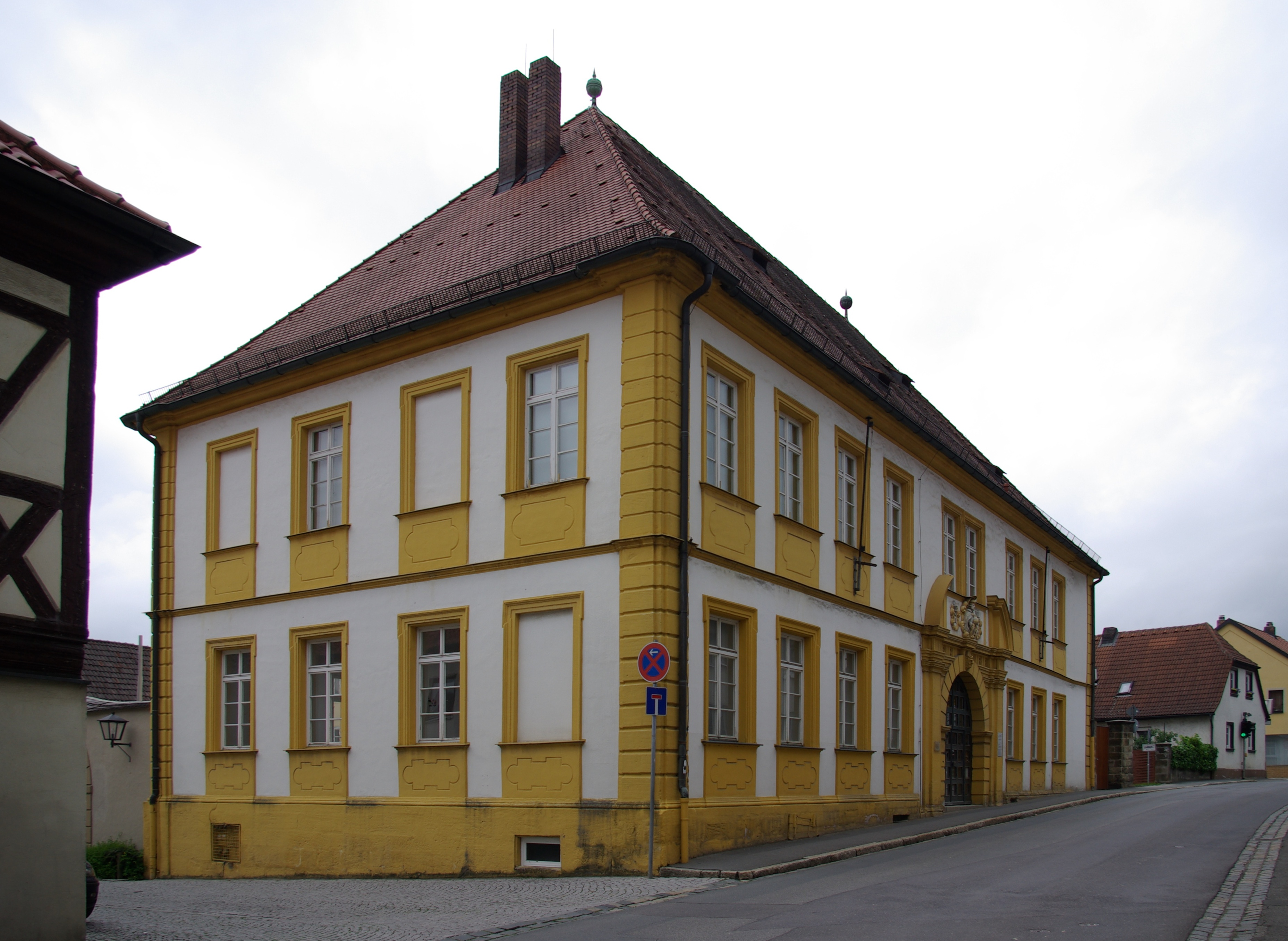 Amtshaus in Bad Staffelstein. Amtshaus des Bamberger Domkapitels (1720 bis 1803), Bezirksamt-Landratsamt (1862 bis 1972), seit 1974 Amt für Landwirtschaft.